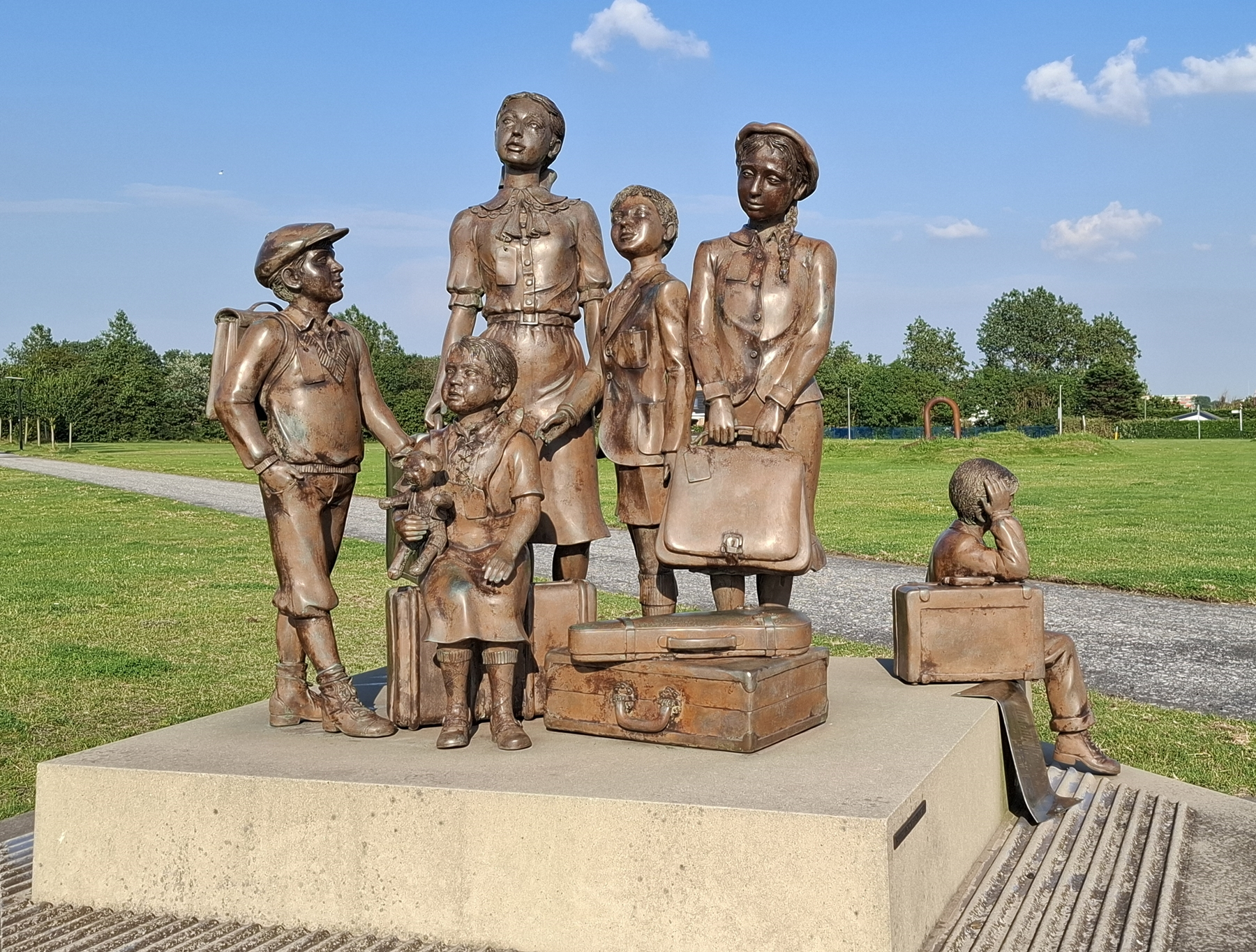 Hoek van Holland, Kon. Emmaboulevard. Kunstwerk "Channel crossing to life" van Frank Meisler & Arie Ovadia. The Netherlands. FOP.